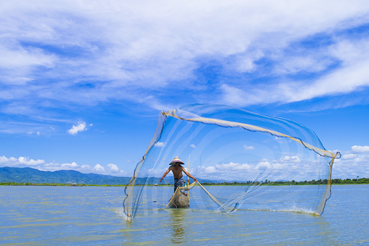 Aktifitas nelayan di danau Limboto